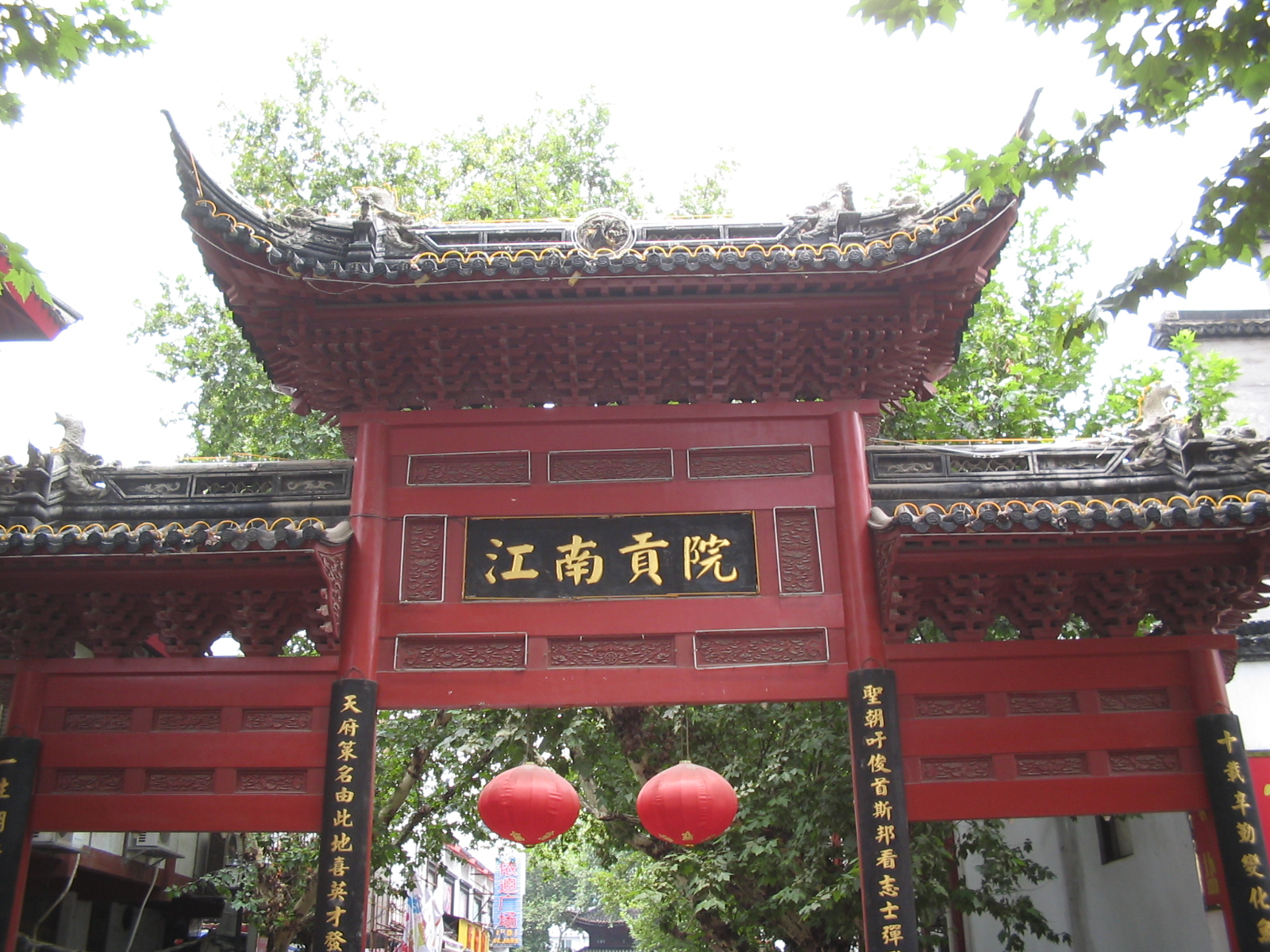 江南贡院，我自己于2005年8月4日在夫子庙拍摄。